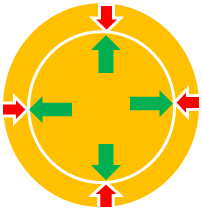 מצב של שיווי משקל, שבו הכוחות השואפים לכווץ את הגוף שווים בגודלם ומנוגדים בכיוונים לכוחות הפנימיים.